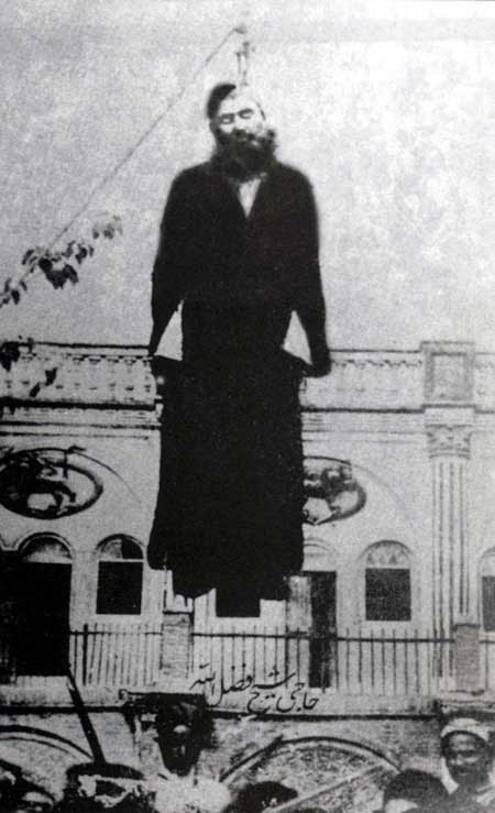 Hanging Sheikh Fazlollah Noori